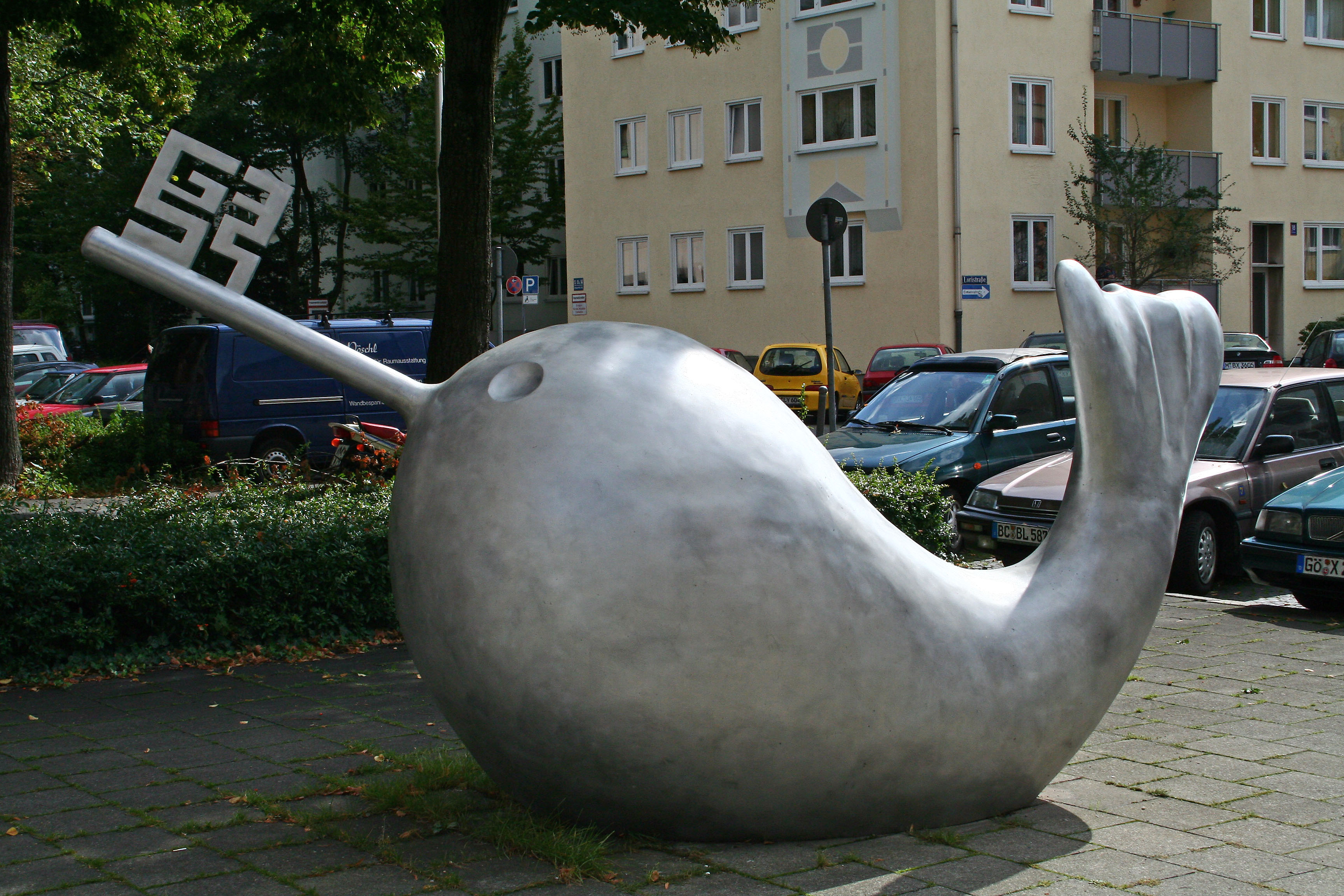 Schlüsselfisch